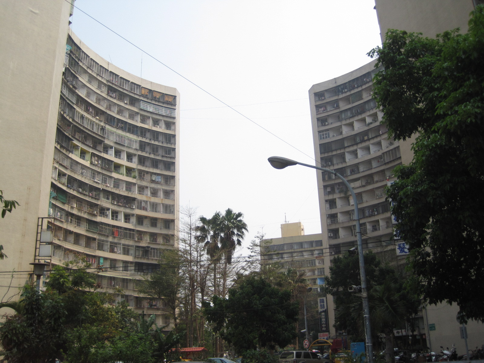 左營果貿社區一景